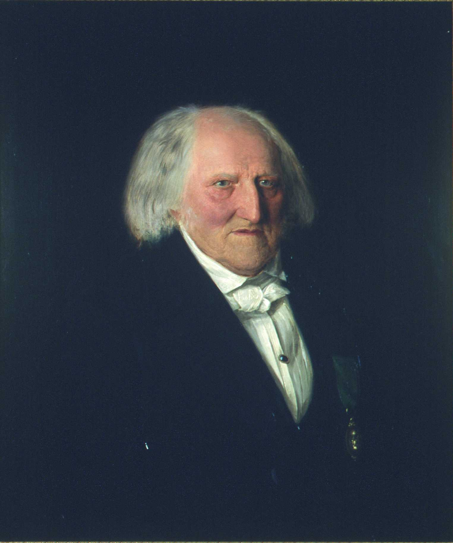 Poul Steenstrup malt av Christian Olsen